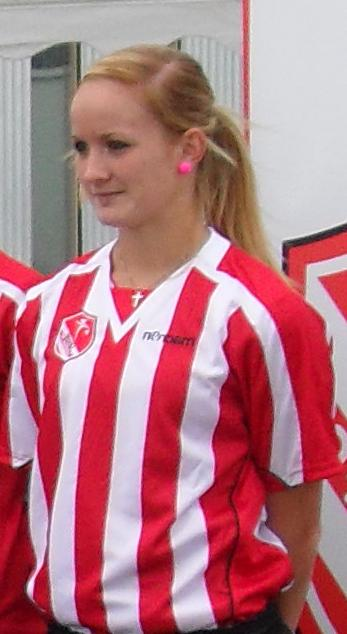 Lincoln Ladies and England defender Sophie Bradley